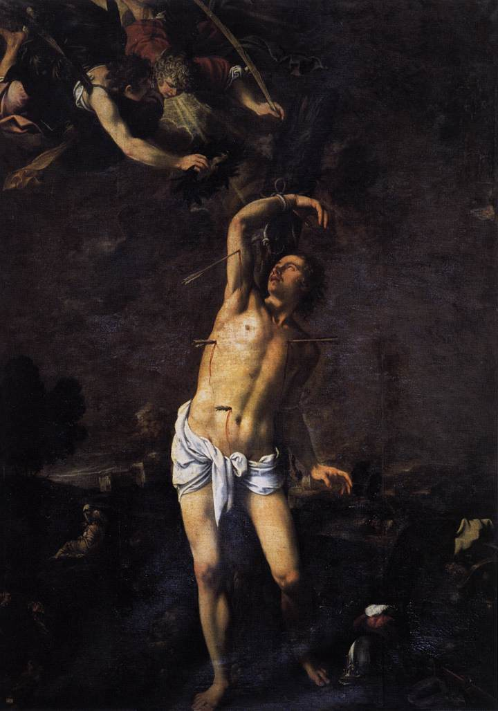 La obra representa el martirio de San Sebastián, que murió asaeteado por profesar el cristianismo.